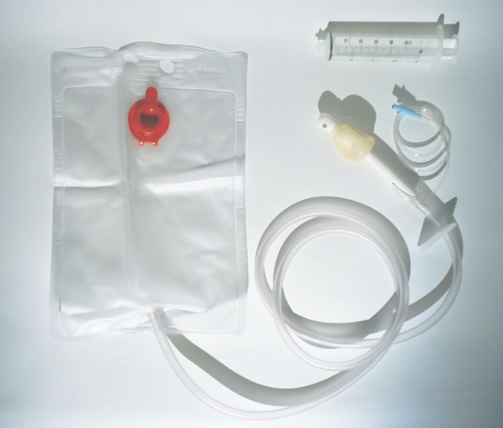 Rectobag - Irrigationsset zur Irrigation und wird auch zum Hebe-Senk-Einlauf verwendet. Der Beutel hat ein Volumen von 2500 ml.